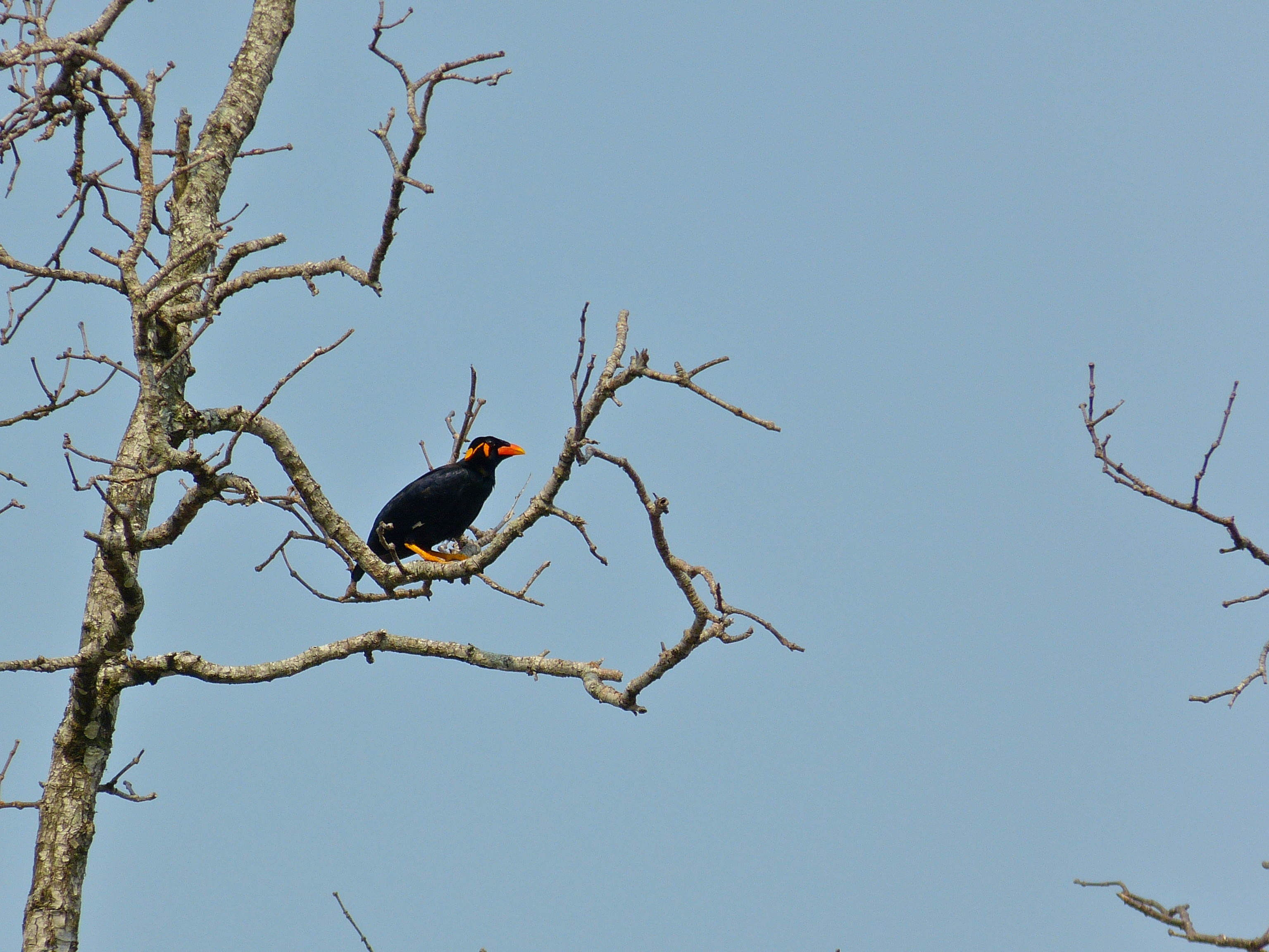 Bako NP, Sarawak, MALAYSIA